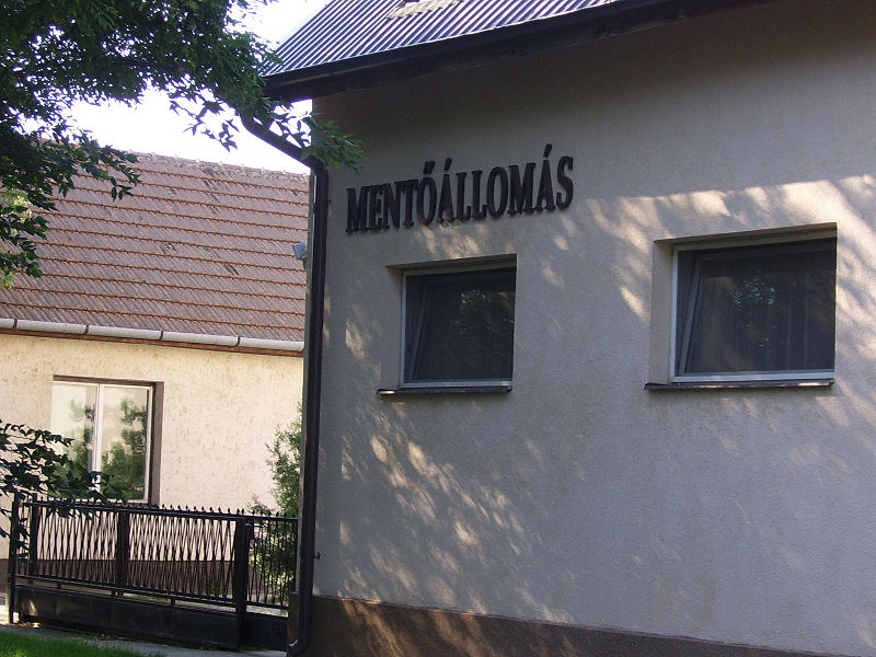 A balkányi mentőállomás.